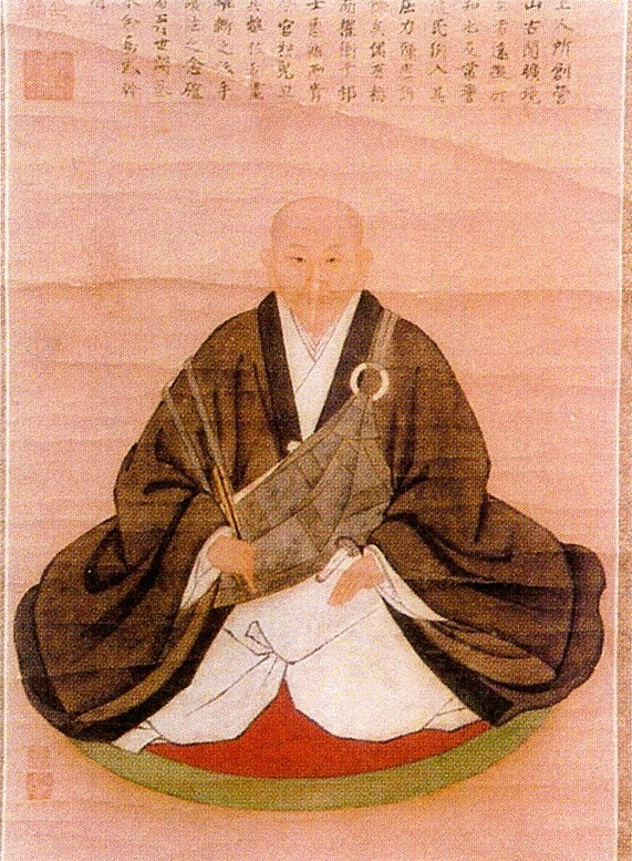 阿波徳島藩洲本城代稲田家4代当主・稲田植栄の肖像画。